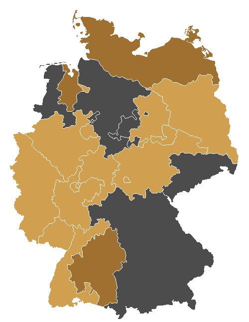 Die Mitgliedskirchen der UEK - the Churches of the Union Evangelical Churches in Germany